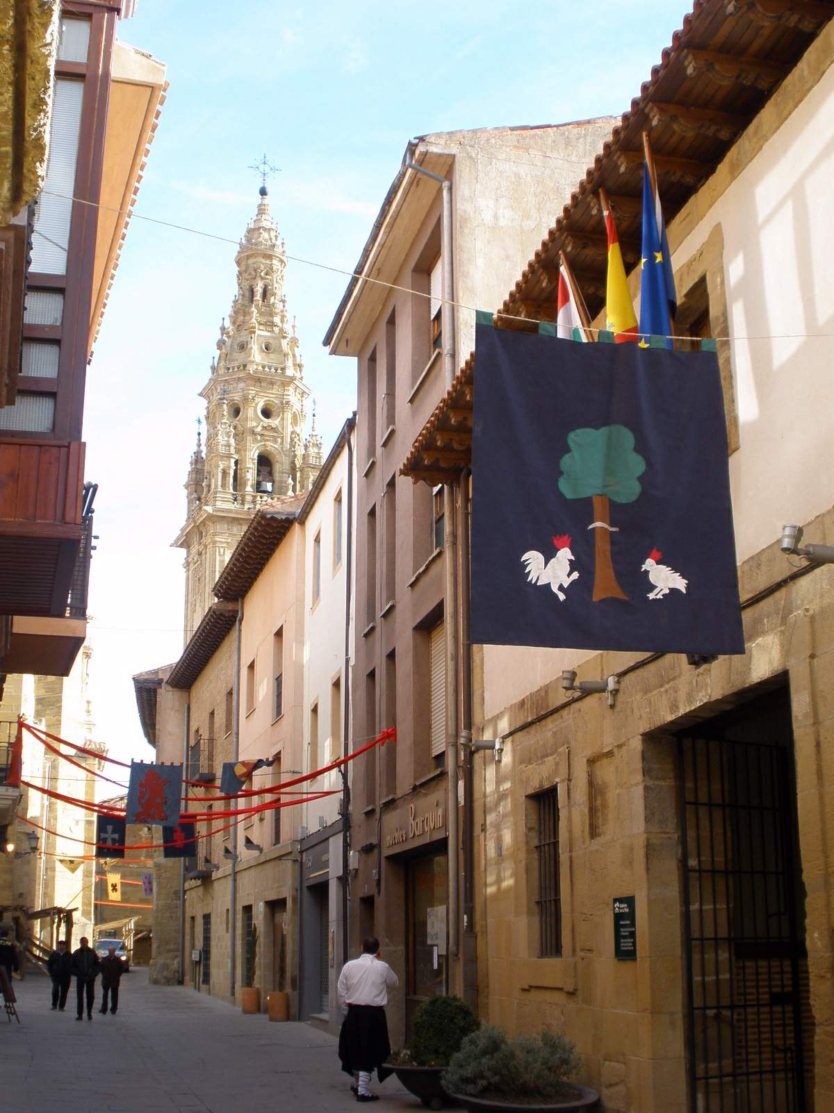 Santo Domingo de la Calzada - Calle Mayor